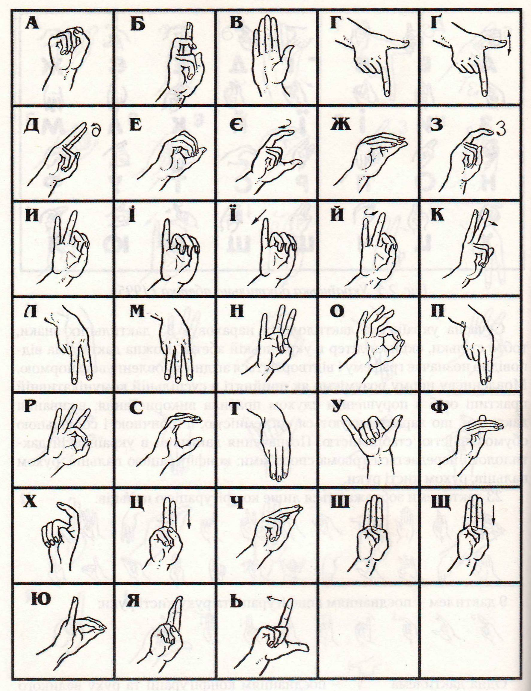 Українська дактильна абетка (УДА), 2003. Відрізняється від УДА радянського зразка присутністю літер Ї, Ґ тощо.